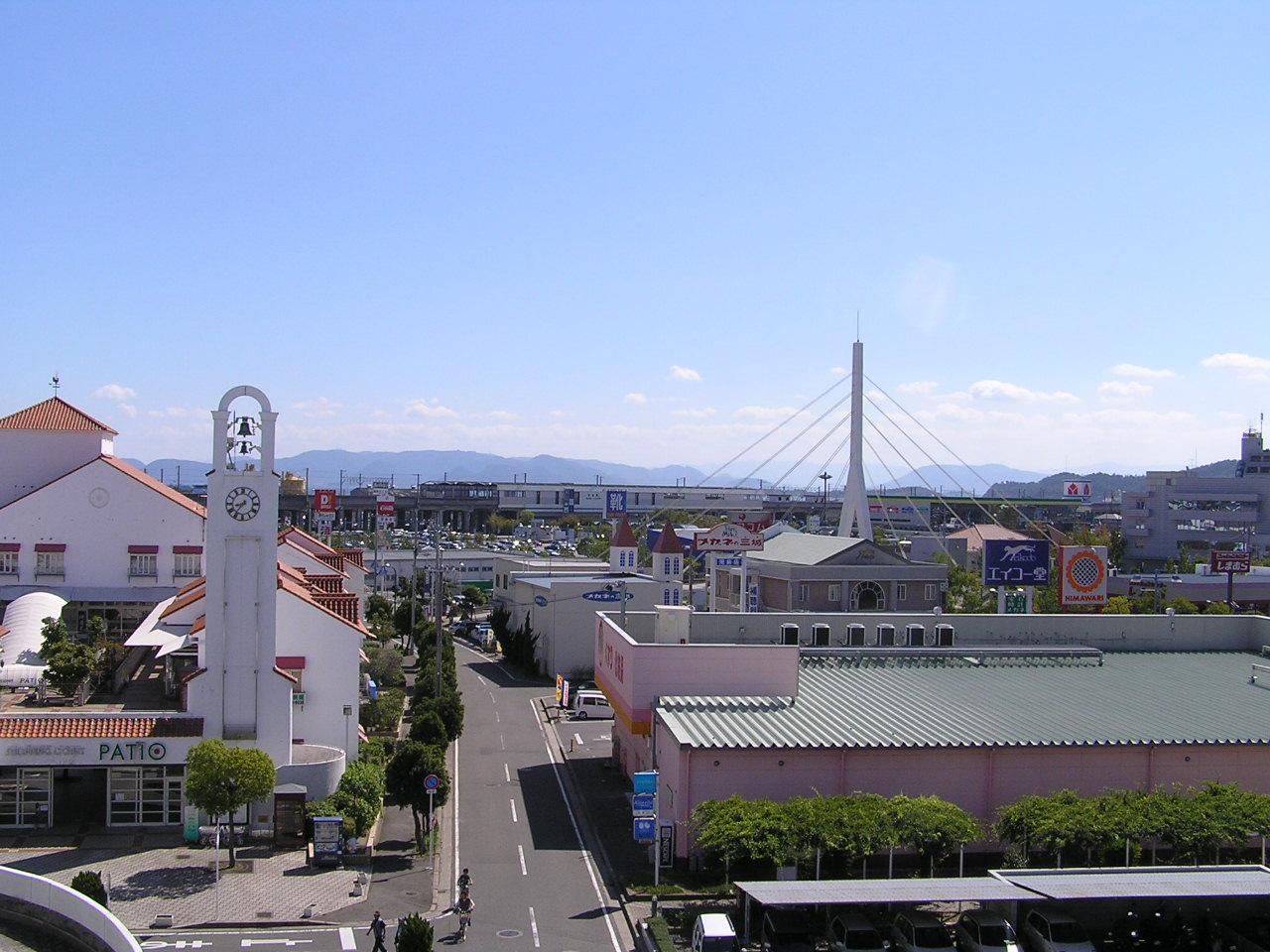 kojima city 1